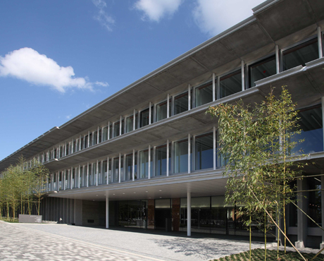 Kyoto Prize Library